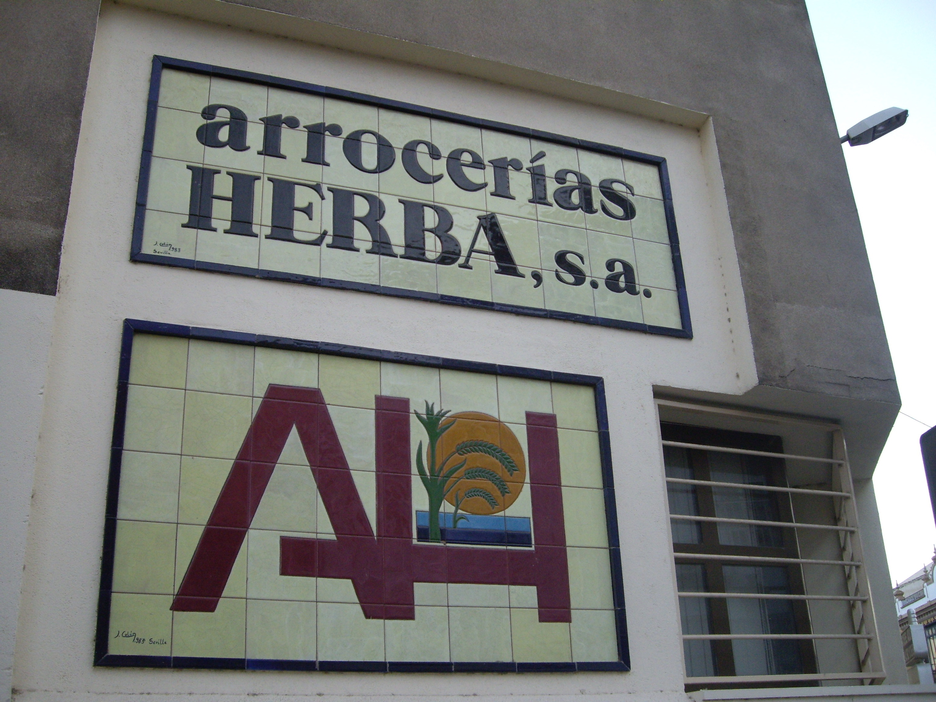 Logo de Arrocerías Herba en San Juan de Aznalfarache, Sevilla.